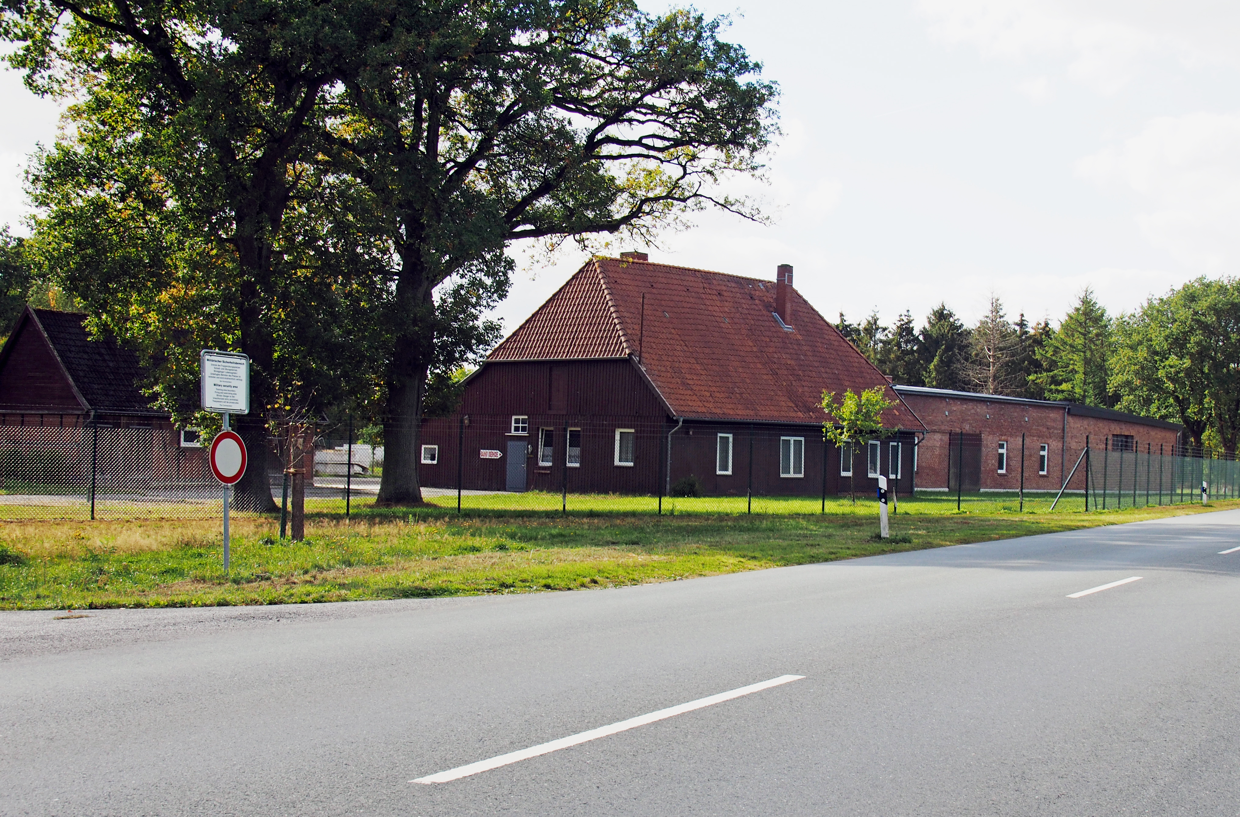 Gebäude in Oberhode (Osterheide), auf dem Truppen-Übungsplatz Bergen